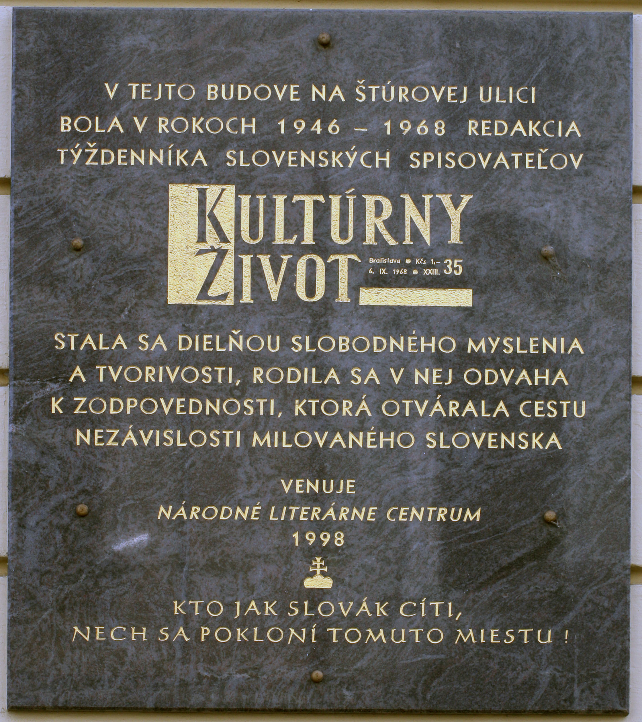 Informačná tabuľa